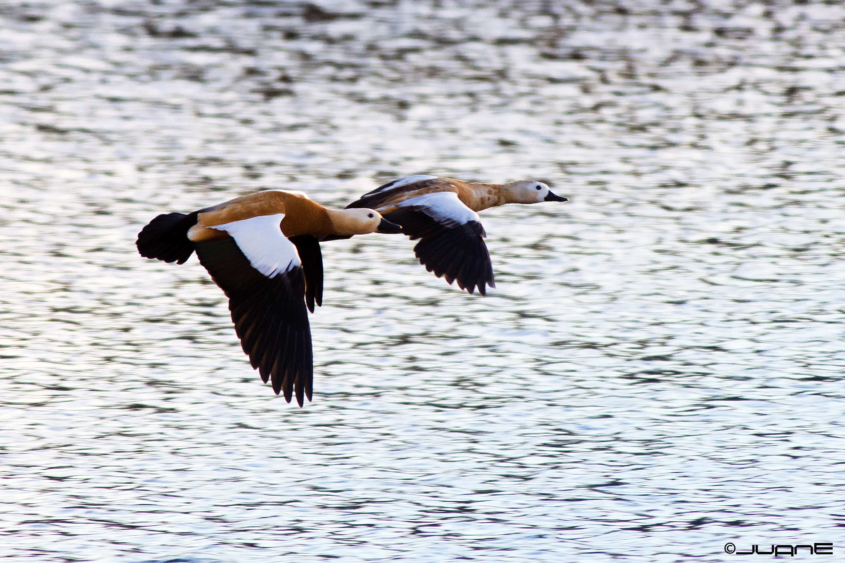 Sigma 300mm f4 APO telemacro+ TC x1,7 = 510 mm